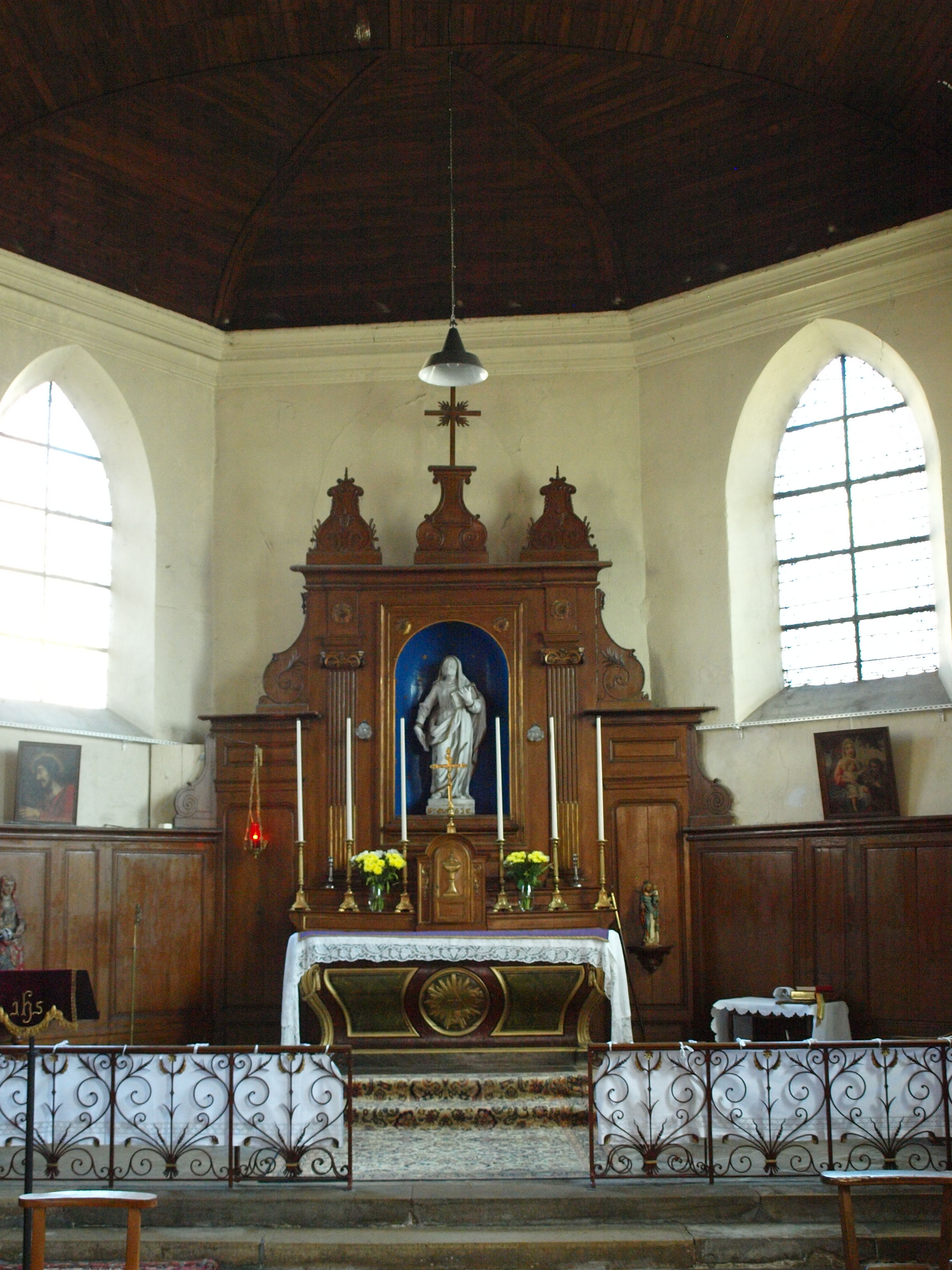 Église Sainte-Mathie de Sens (Yonne, France)